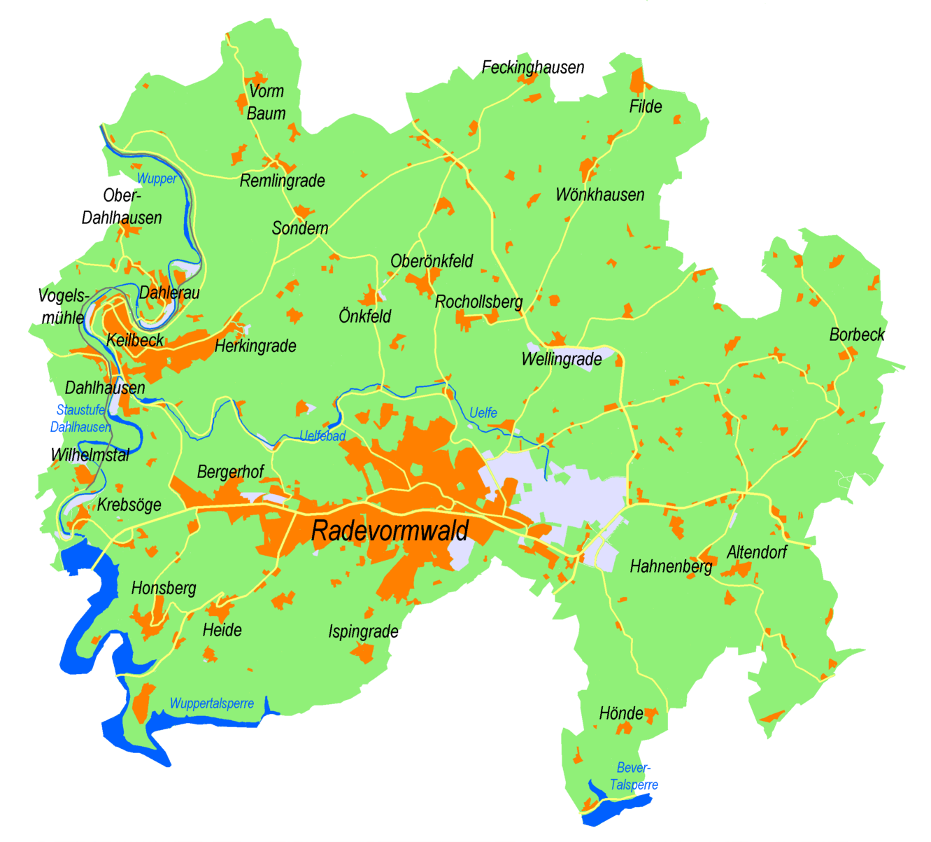 Karte von Radevormwald im Oberbergischen Kreis, NRW, Deutschland 2005 selbst erstellt